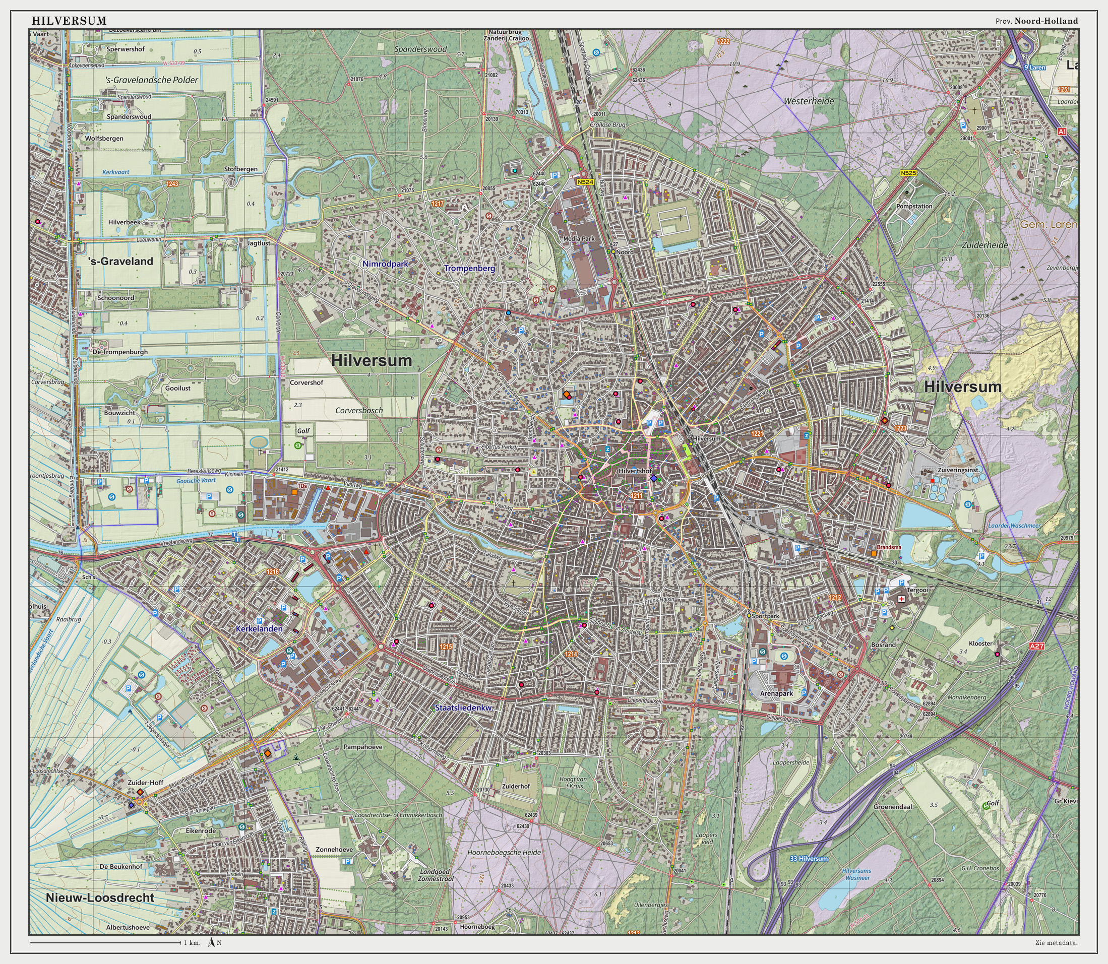 Topografische kaart van Hilversum (woonplaats). Resolutie: 300 pixels/km. Kaartbeeld samengesteld uit de open geodata van de Top10NL en Top25namen (Basisregistratie Topografie, Kadaster), Creative Commons BY licentie. Gebouwvlakken uit open geodata BAG extract. Wegen uit de OpenStreetMap, OpenStreetMap community. Reliëfschaduw uit de Actuele Hoogtekaart AHN2. Samenstelling en kleurenschema: Jan-Willem van Aalst, met QGIS2. Zie ook de Legenda.